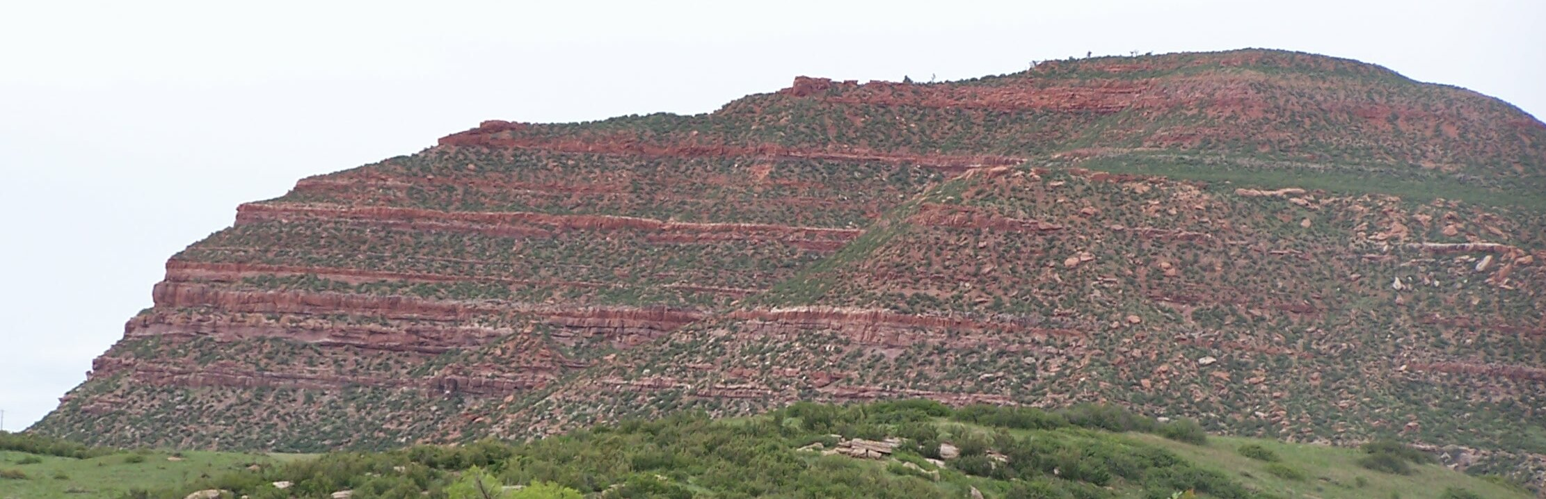 Opeenvolging van competentere zandstenen en recessievere silt- en kleistenen in de Amerikaanse staat Colorado. Eigen werk 13-06-2005